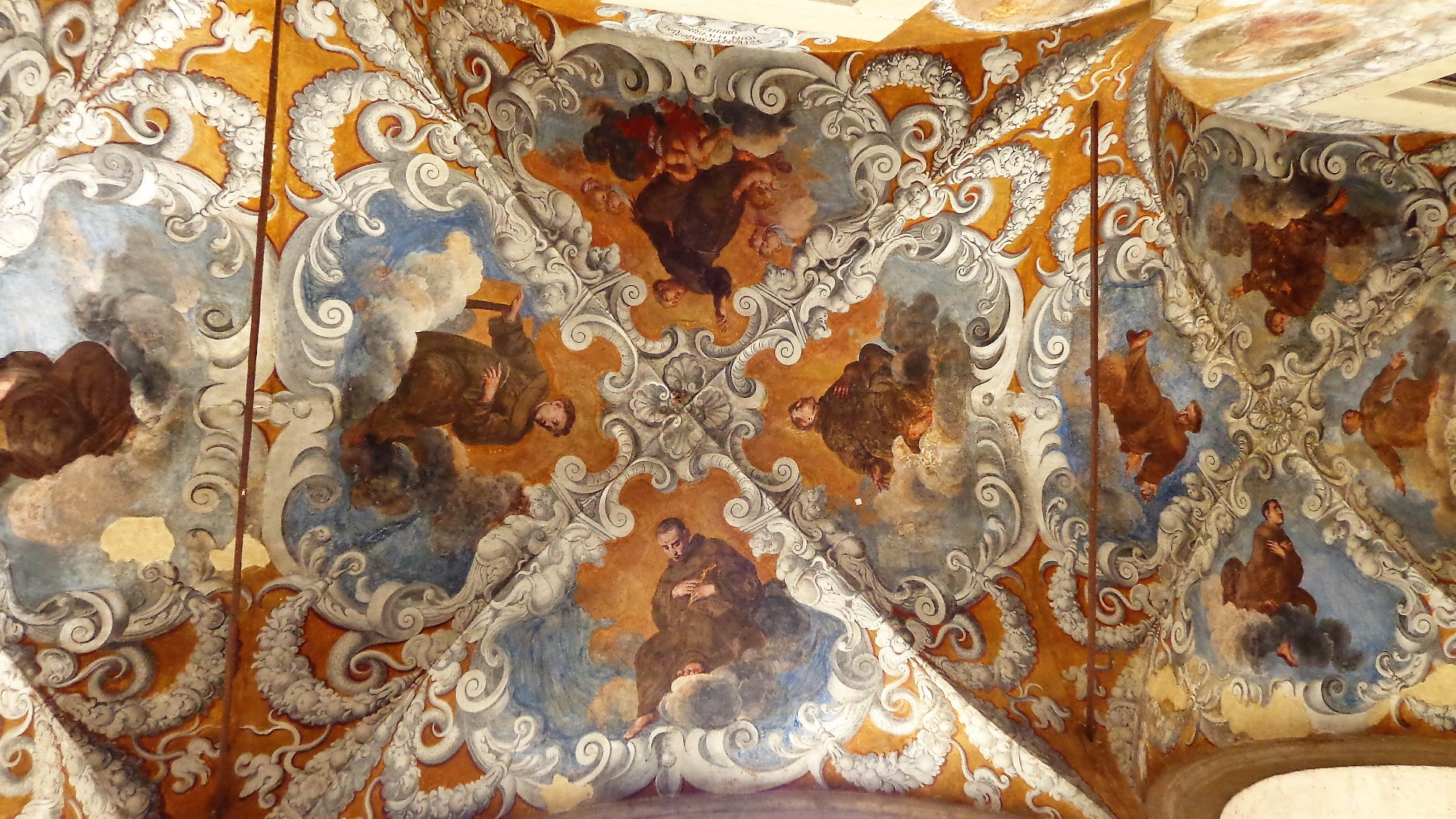 Affreschi volta portico occidentale.